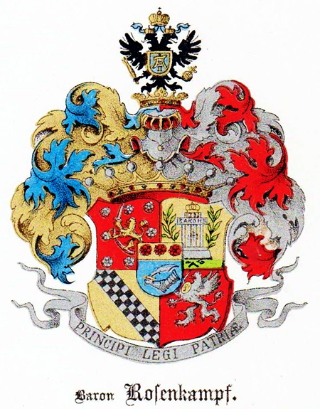 Wappen des Barons Rosenkampff (13. Jul 1817)